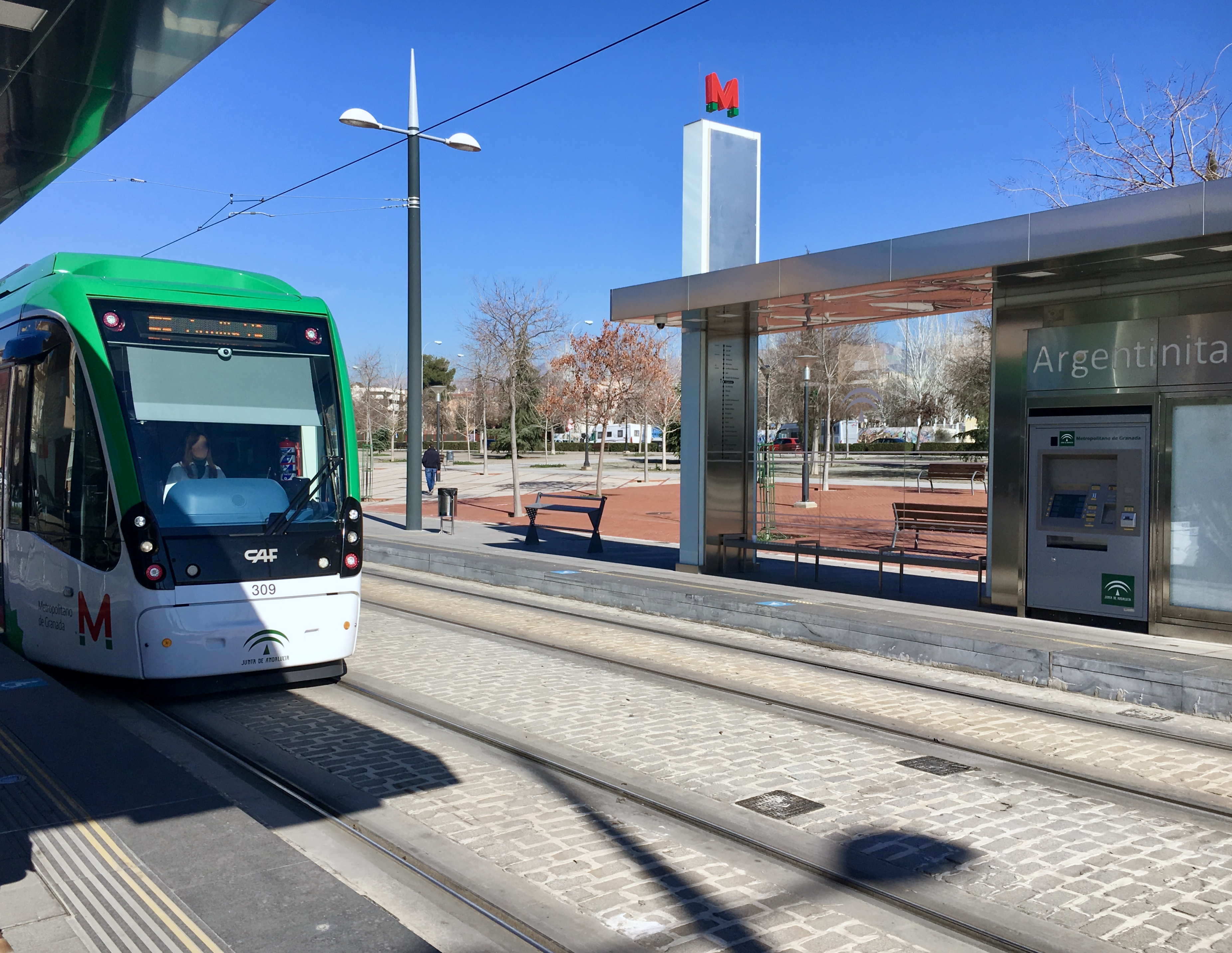 Estación de Argentinita del Metro de Granada